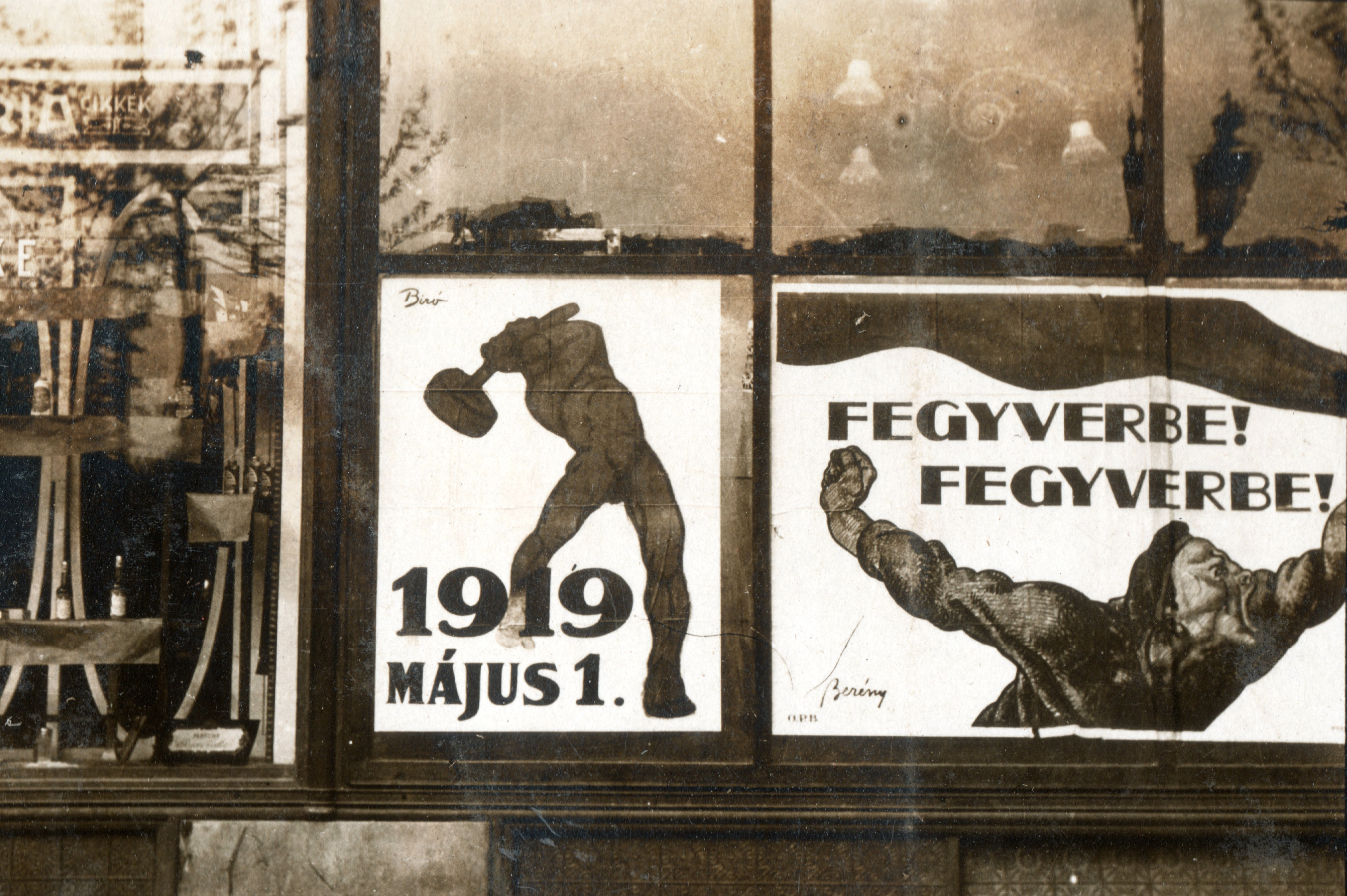 Kommunista plakátok Budapesten 1919. május 1.